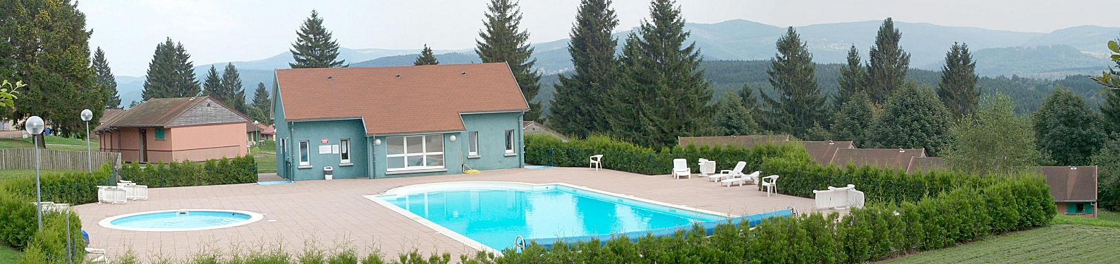 Panorama de centre de vacances VVF de Plaine (67 Alsace) prise depuis les piste de randonnées